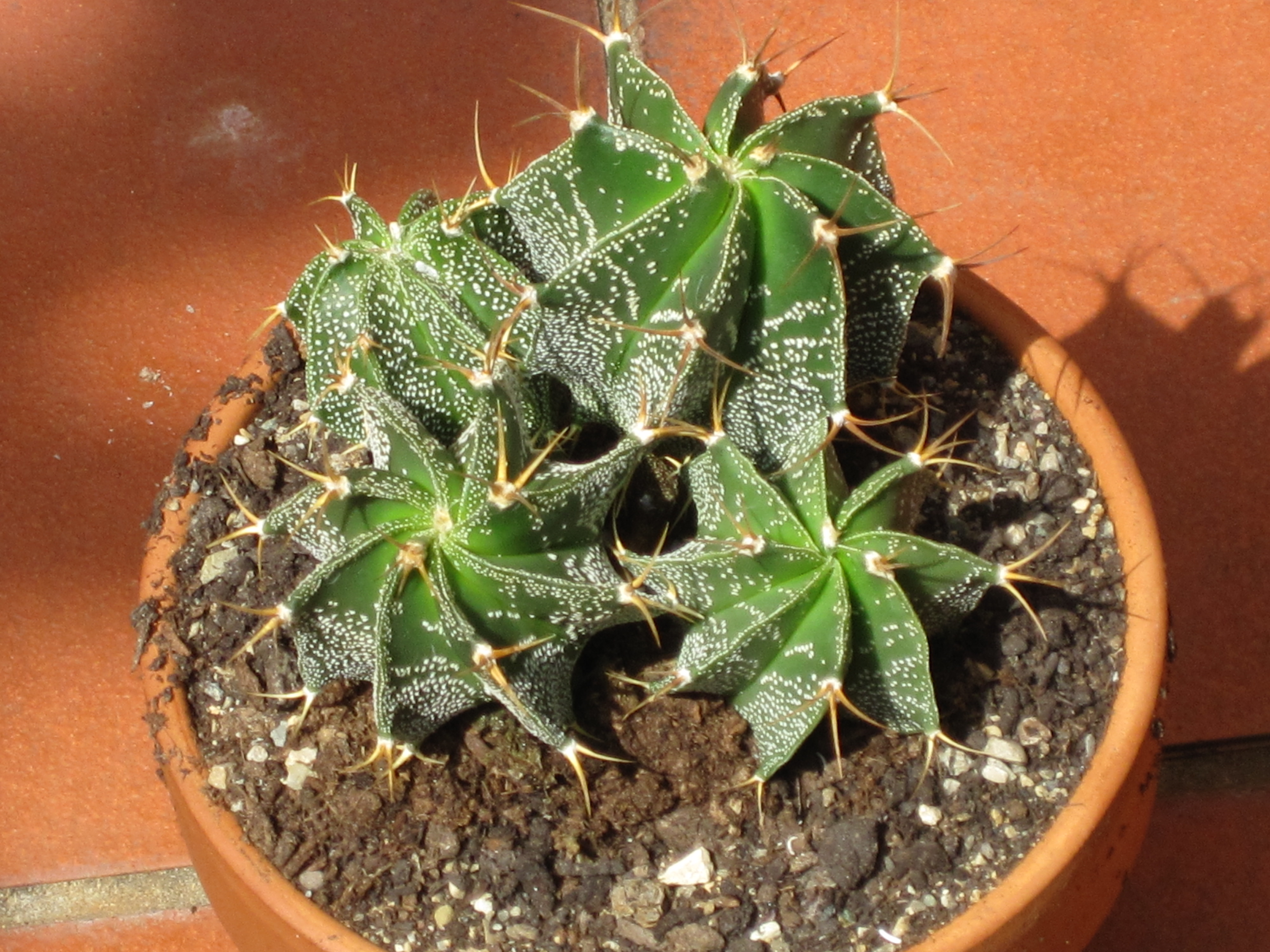 Un gruppo di astrophytum ornatum in vaso